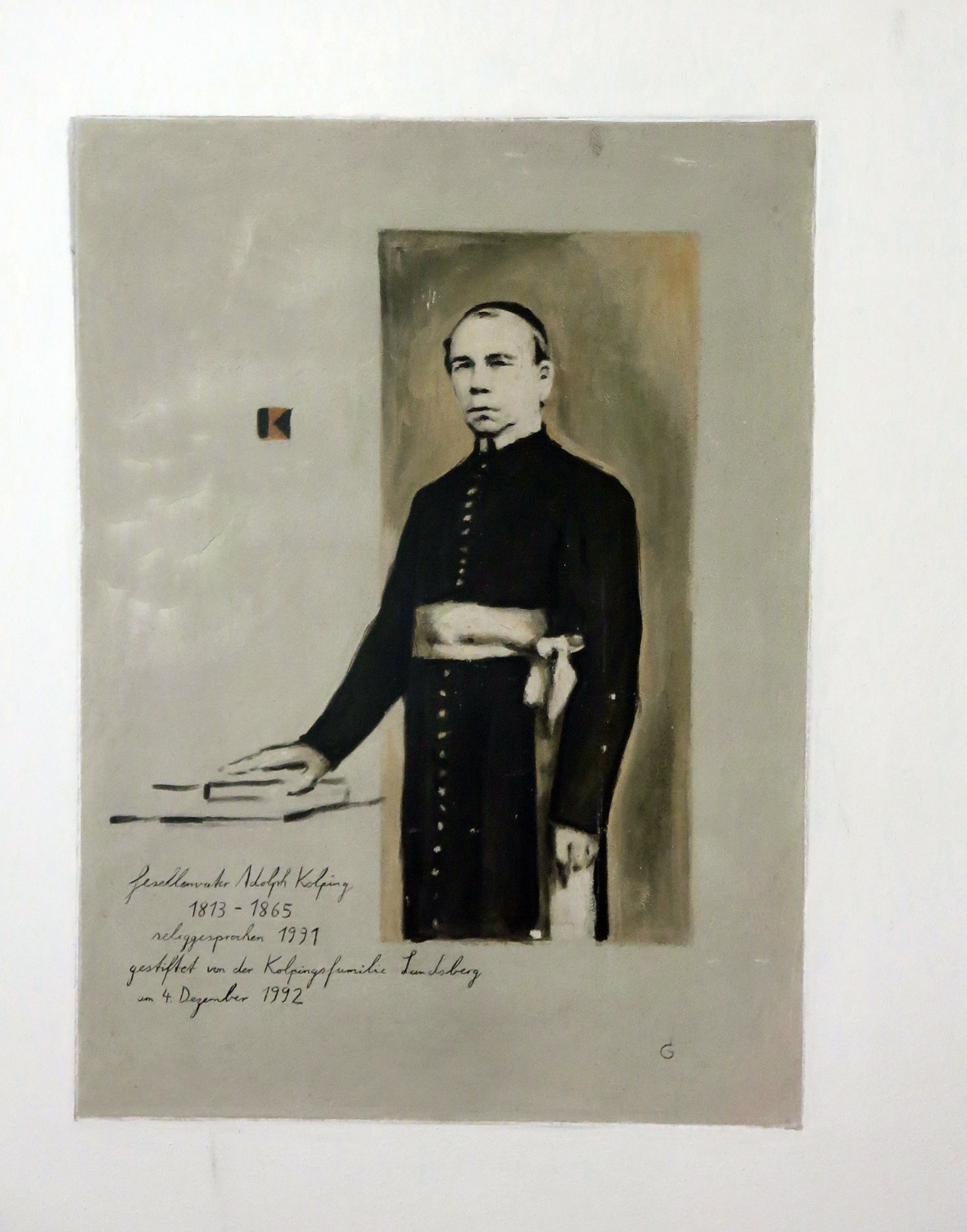 Stadtpfarrkirche Maria Himmelfahrt Landsberg, Kapelle des südl. Seitenschiffs, Kolping, Fresko von Martin Gensbaur, 1992